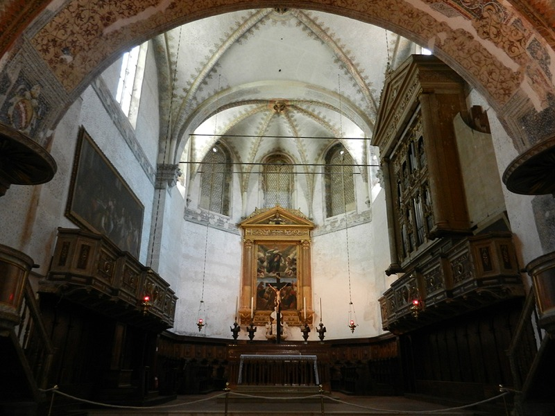 Brescia - Presbiterio all'interno della Rotonda (Duomo Vecchio)